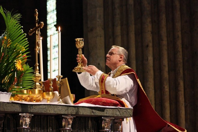 Le chanoine Dominique Aubert, recteur de la cathédrale de Chartres par nomination de Mgr Pansart depuis 2006, célébrant la Forme extraordinaire du rite romain.